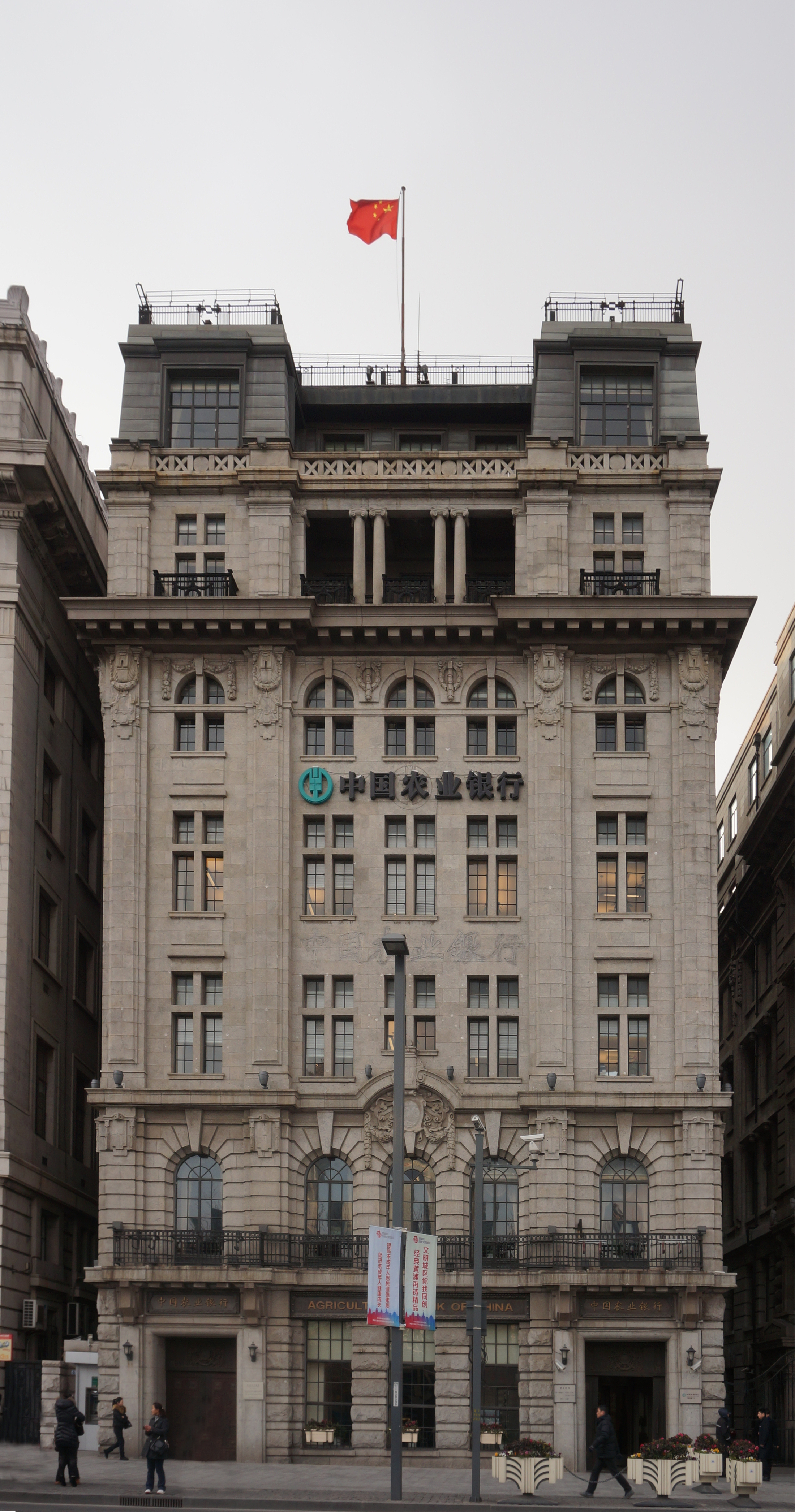 外滩扬子大楼